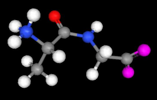 dipeptid H-Ala-Gly-OH -Ball and stick molecular graphic created by program Ghemical